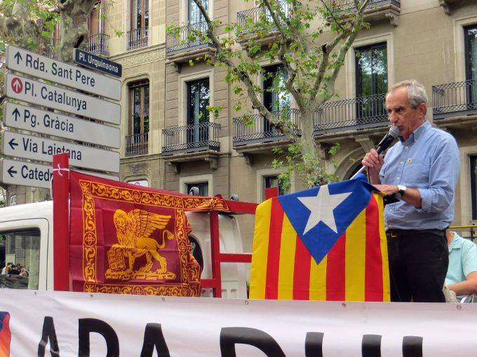 Jordi Fornas a la Plaça Urquinaona durant l'acte del seu partit l'Onze de Setembre del 2018